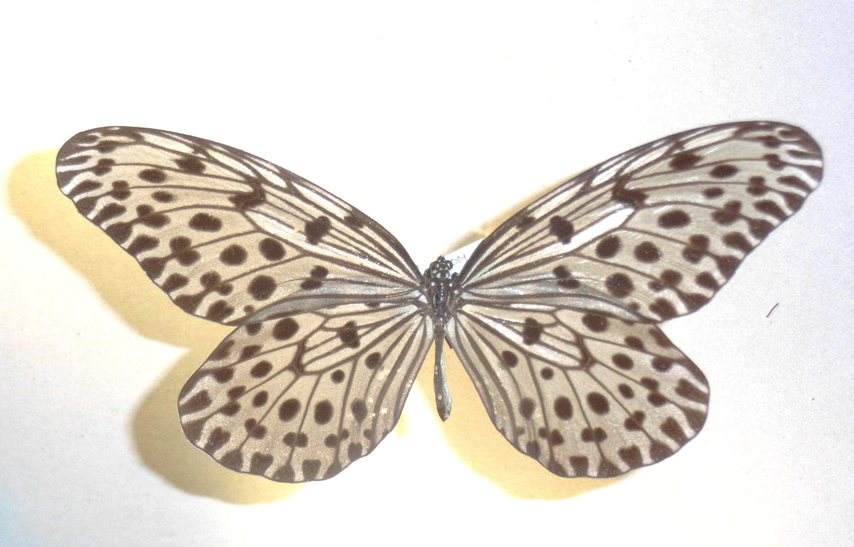 Idea iasonia